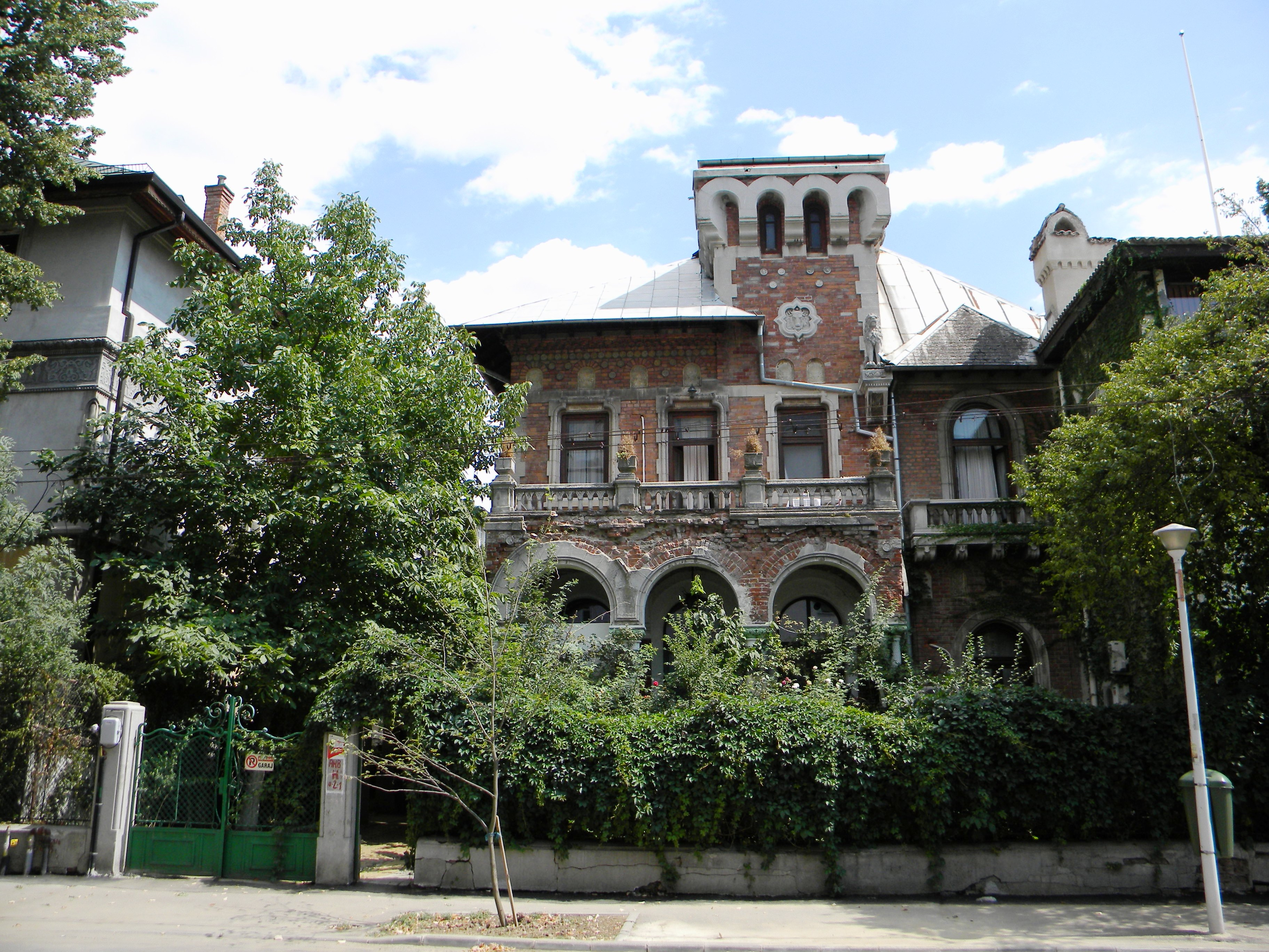 Imobil pe Str. Atena, nr. 4, Bucuresti sect. 1